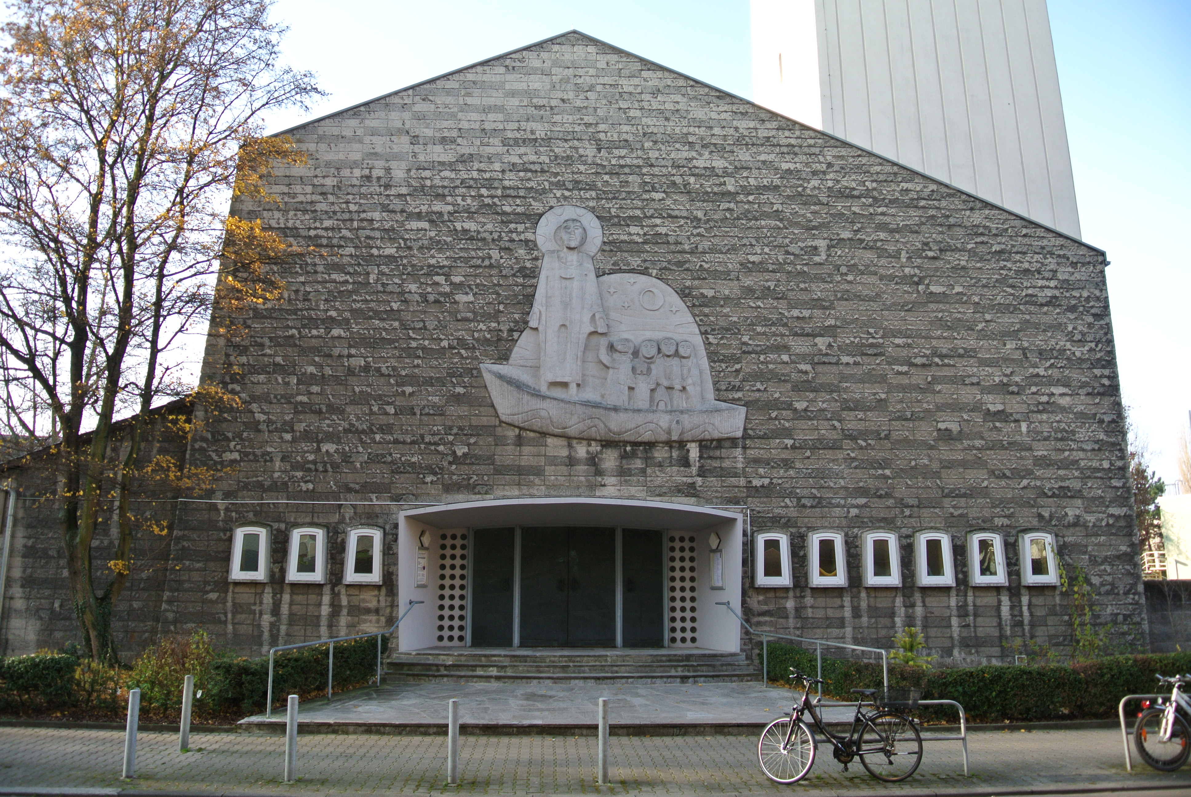 Evangelische Neue Nicolaikirche im Frankfurter Ostend 1909 von Robert Curjel erbaut, nach Kriegszerstörung 1959 von Hans Bartholmes weitgehend neu aufgebaut, Ostfassade mit Eingang